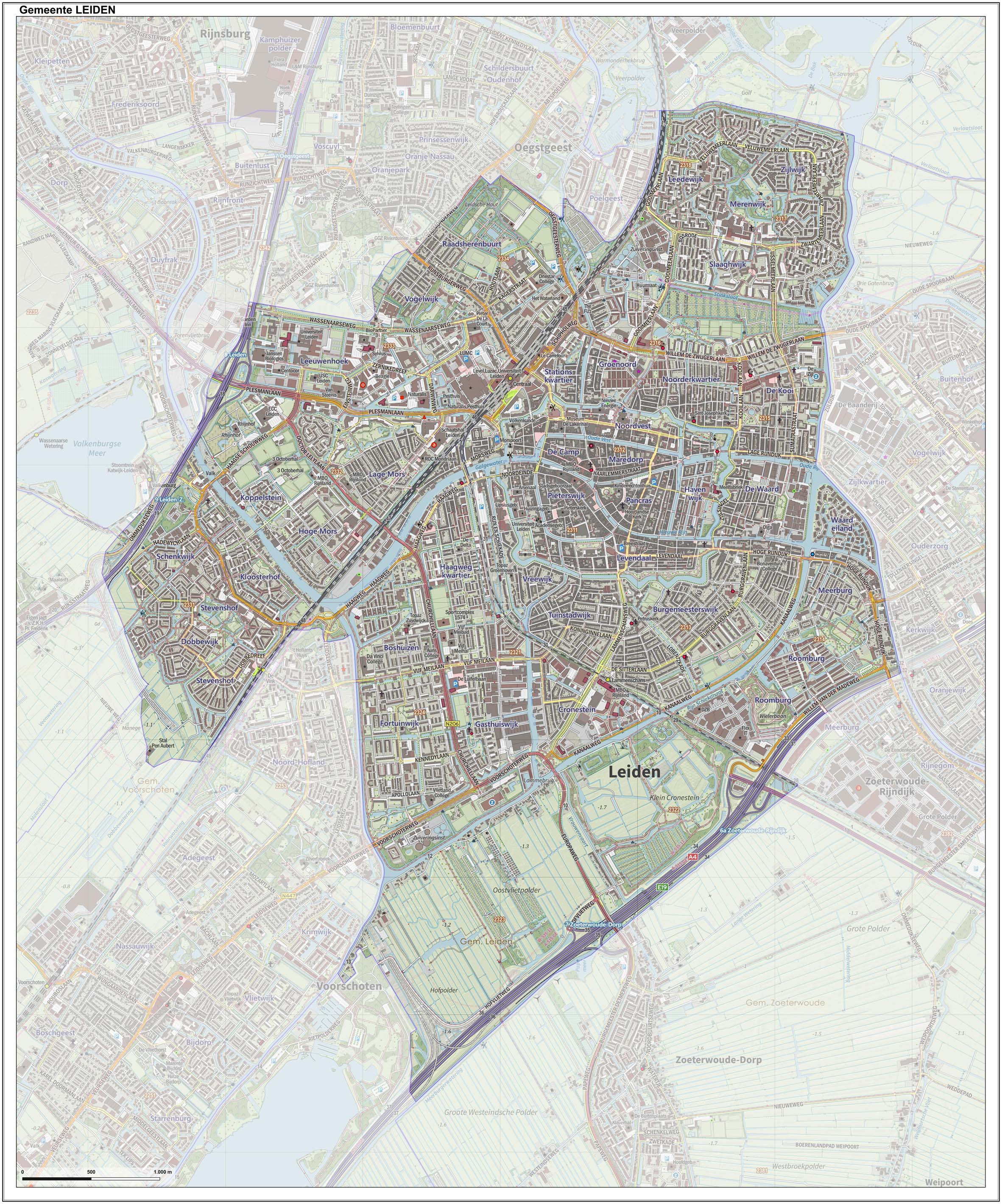 Topografische gemeentekaart. Resolutie: 400 pixels/km. Kaartbeeld samengesteld uit de open geodata van de Top10NL en Top25namen (Kadaster), Creative Commons-BY licentie. Gebouwvlakken uit open geodata BAG extract. Wegen uit de OpenStreetMap, OpenStreetMap community. Reliëfschaduw uit de Actuele Hoogtekaart AHN2. Samenstelling en kleurenschema: Jan-Willem van Aalst, met QGIS. Zie ook de Legenda.